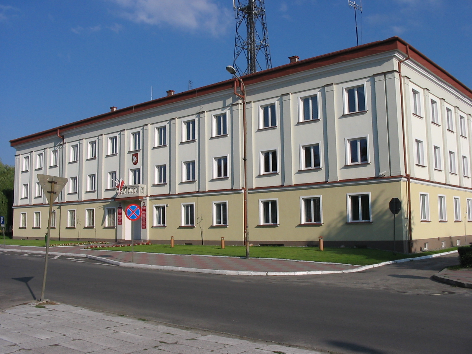 Siedziba Starostwa Powiatowego w Lubaczowie